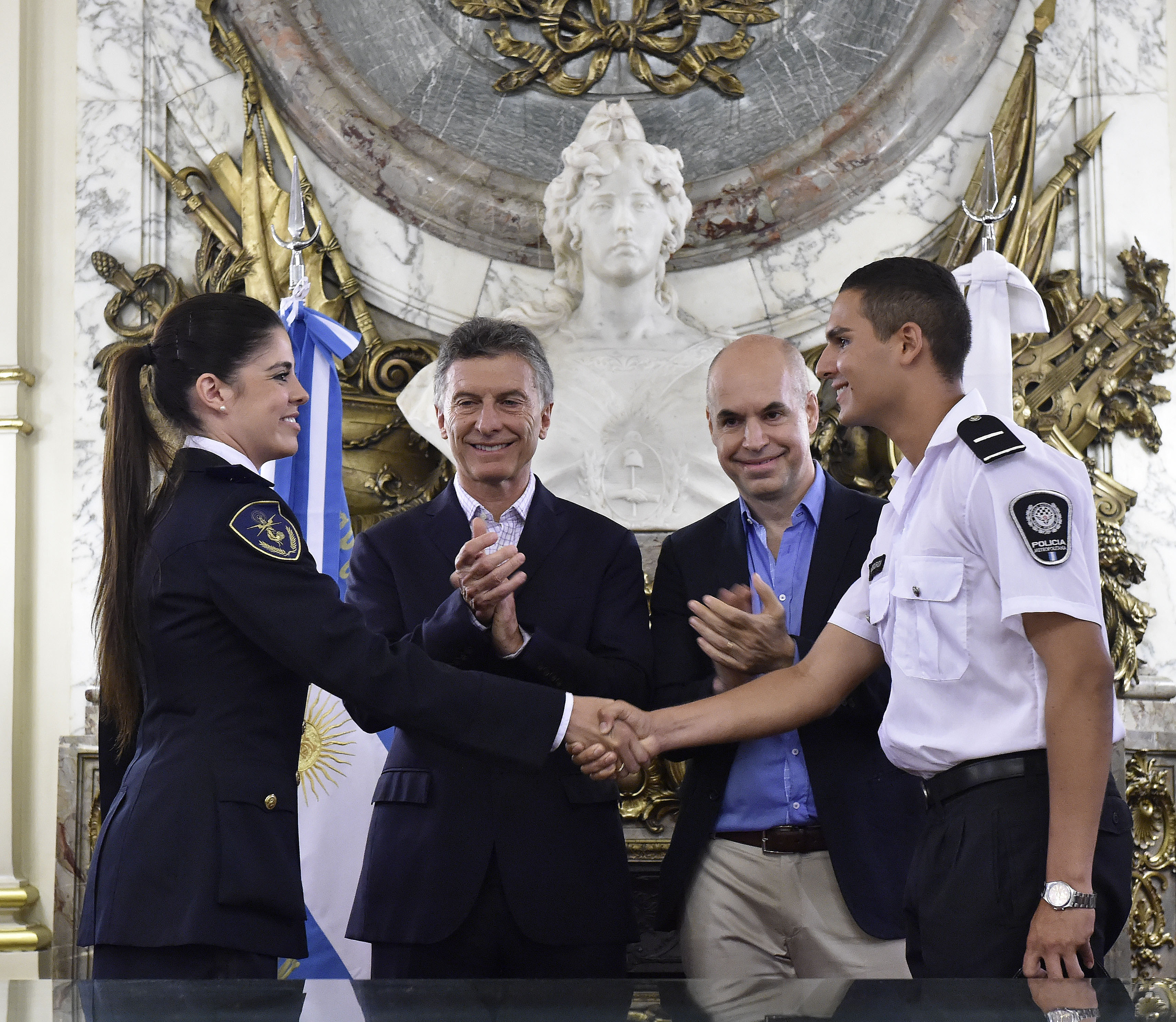 El presidente Mauricio Macri y el jefe de Gobierno porteño, Horacio Rodríguez Larreta, firmaron el convenio por el cual el Estado nacional transfiere a la ciudad de Buenos Aires parte de la estructura de la Policía Federal Argentina.